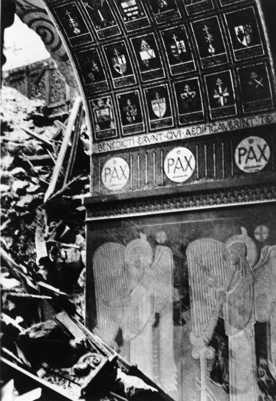 Monte Cassino, Basilika, Zerstörungen So wüteten die anglo-amerikanischen Bomber und Artillerie-Geschosse im Kloster Monte Cassino. Die Gewölbe der wundervoll ausgeschmückten Basilika sind eingestürzt und haben die herrlichen Mosaikbilder und Wandmalereien unter sich begraben. Ein stehengebliebener Pfeiler klagt an: "Pax!" (Friede). PK-Aufnahme Kriegsberichter Czirnich 30.3.44 [Herausgabedatum] (1145)